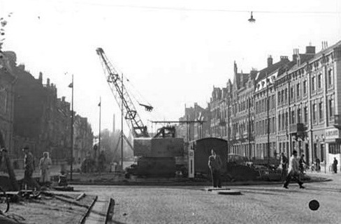 Graafwerkzaamheden t.b.v. de plaatsing van het Mariamonument op de kruising Stationsstraat-Wilhelminasingel in Maastricht. Fotocollectie RHCL Maastricht, GAM 1196.